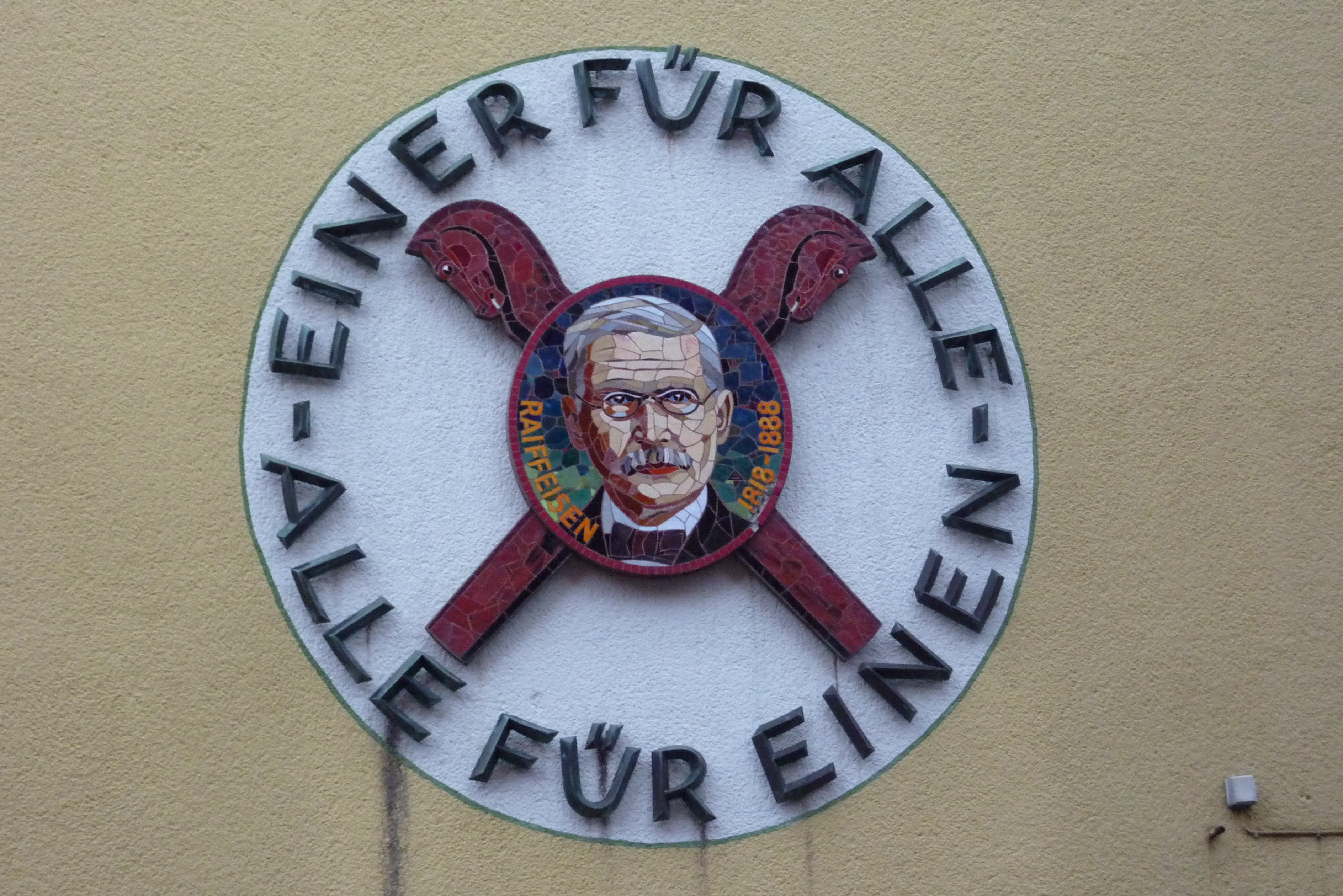 Bildnis von Friedrich Wilhelm Raiffeisen an der Mittelmoselhalle in Kröv